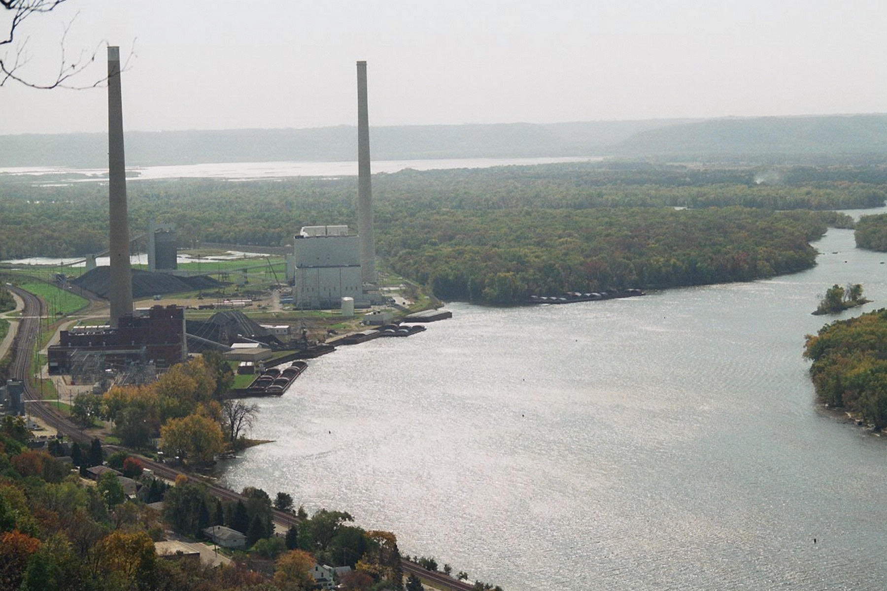 Alma-buena-vista-sued